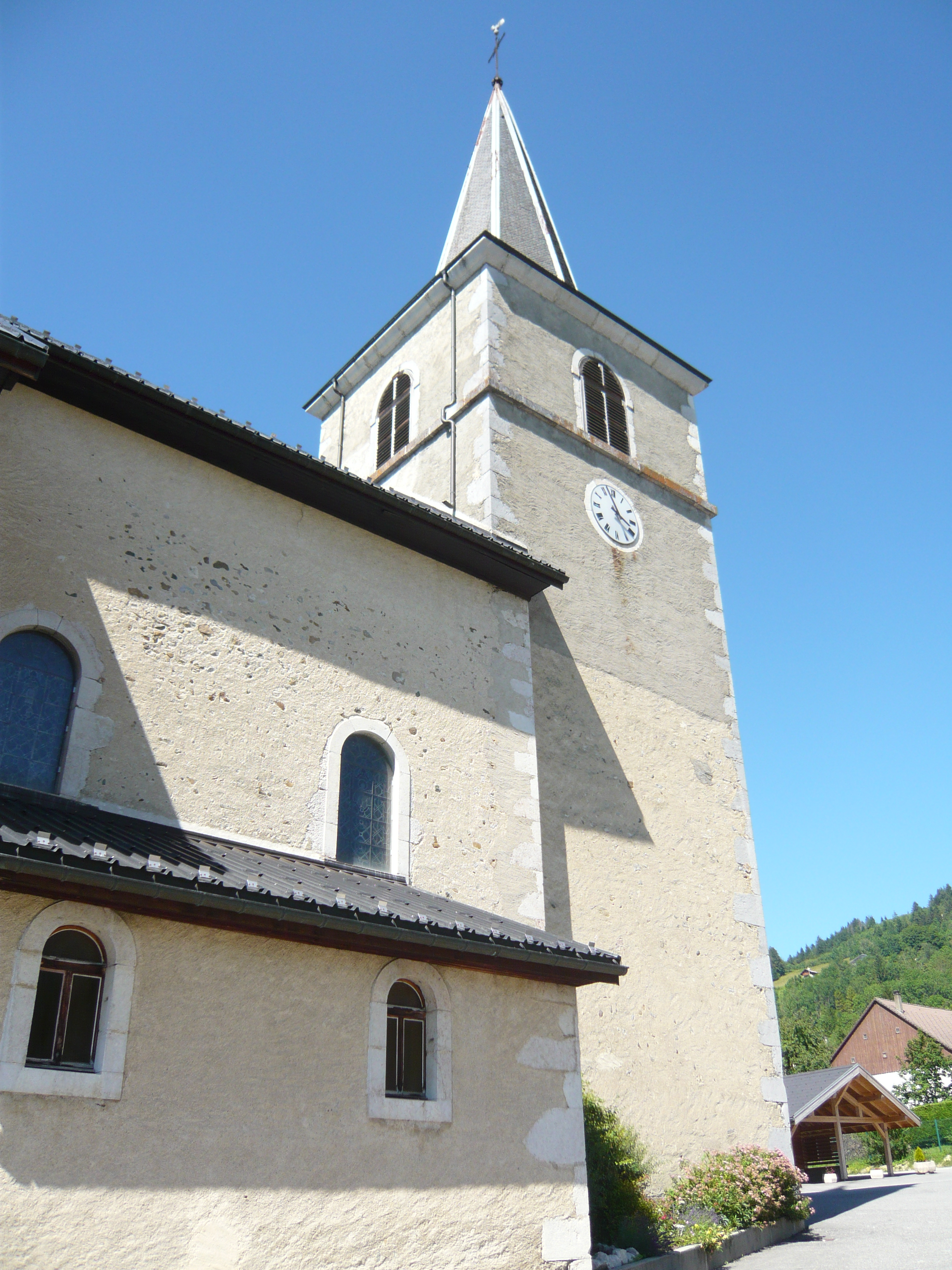 clocher vu du sud (église Saint-François-de-Sales d'Habère-Poche)